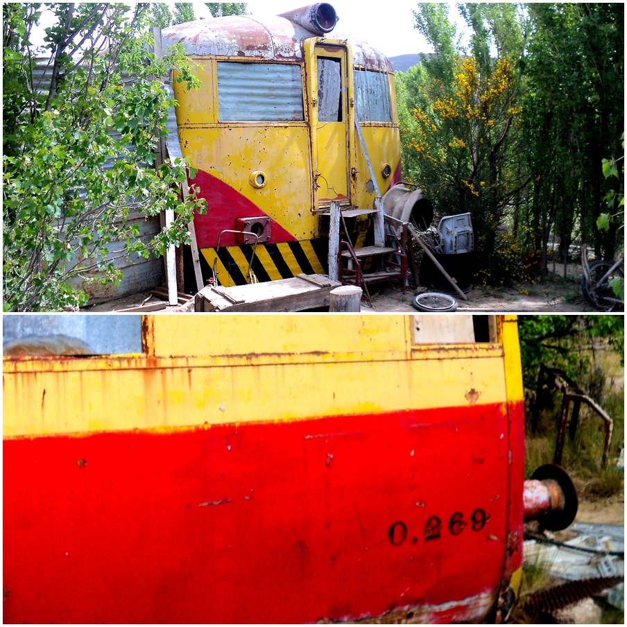 Drewry frontal y con su número de serie abandonado en el cordón forestal de Comodoro.